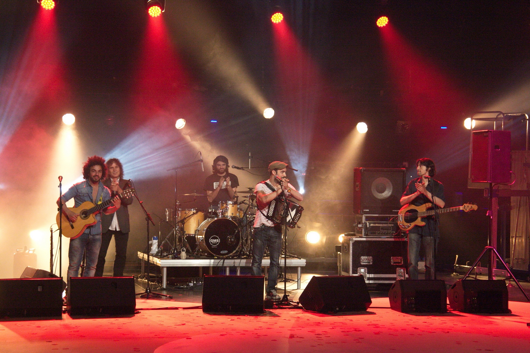 Lliurament dels Premis Nacionals de Cultura de Catalunya 2014. Santa Coloma de Gramenet, 2 de juny de 2014